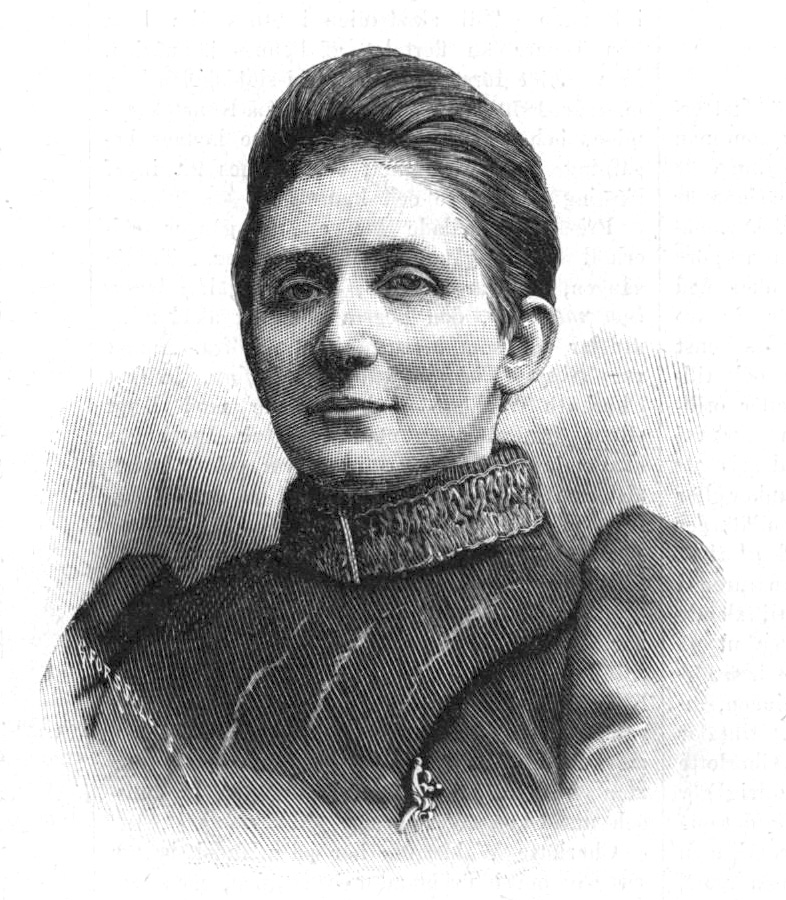 Charlotte Wahlström (1849-1924)